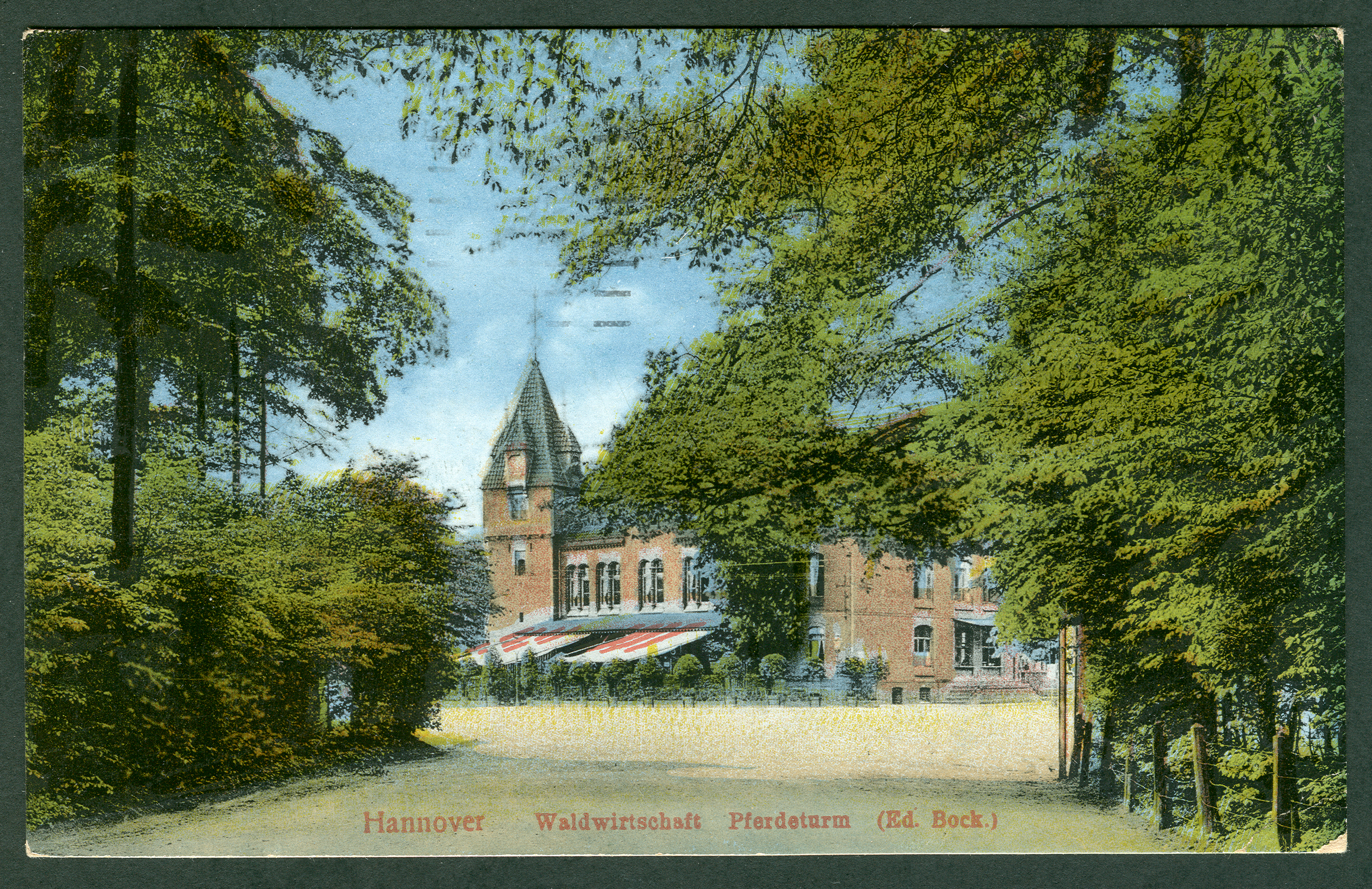 Eine der wenigen kolorierten Ansichtskarten von Karl Friedrich Wunder: In der Vergrößerung ist hier beispielhaft deutlich zu erkennen, weshalb kolorierte Ansichtskarten Anfang des 20. Jahrhunderts häufig so "verschwommen" wirken: Die Bildseite wurde hier zweimal bedruckt - einmal uni und einmal mit verschiedenen Farben, wobei der "Farbdruck" nicht mit dem originalen Lichtdruck zur Deckung kam. Das originale Foto wurde aus der heutigen Kaulbachstraße aufgenommen mit Blick auf die Waldwirtschaft Pferdeturm (damaliger Inhaber: Ed. Bock.). Gegenüber früheren Postkarten-Beschriftungen fehlt dieser 1916 postalisch "gelaufenen" Karte der zuvor obligatorische Satzpunkt (der aber noch hinter dem Namen “Ed. Bock.” gebraucht wird). Auch die Schreibweise des früheren "Pferdethurms" entspricht hier nun schon der heute gebräuchlichen.